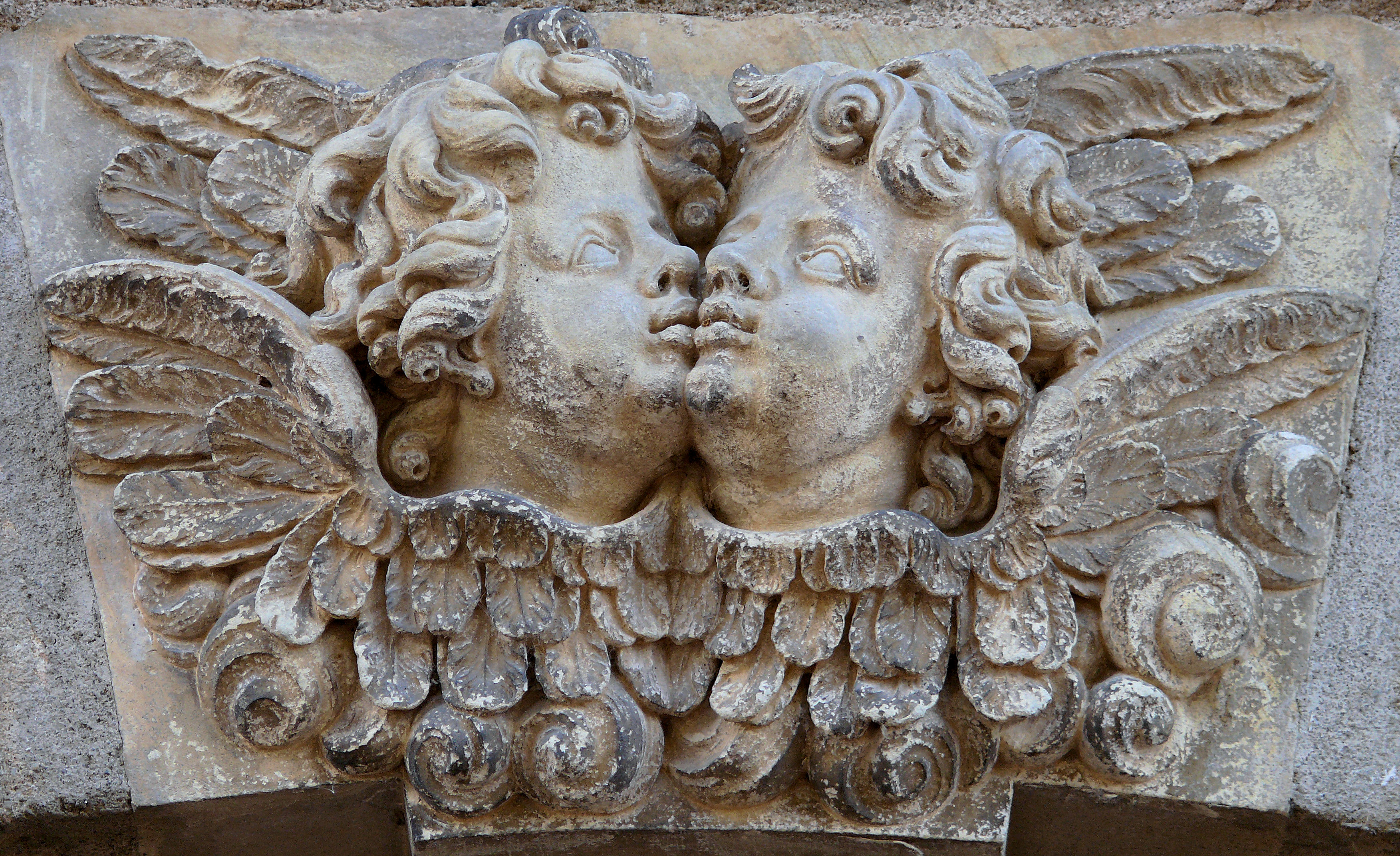 Saint-Menoux - Maison des Vertus cardinales